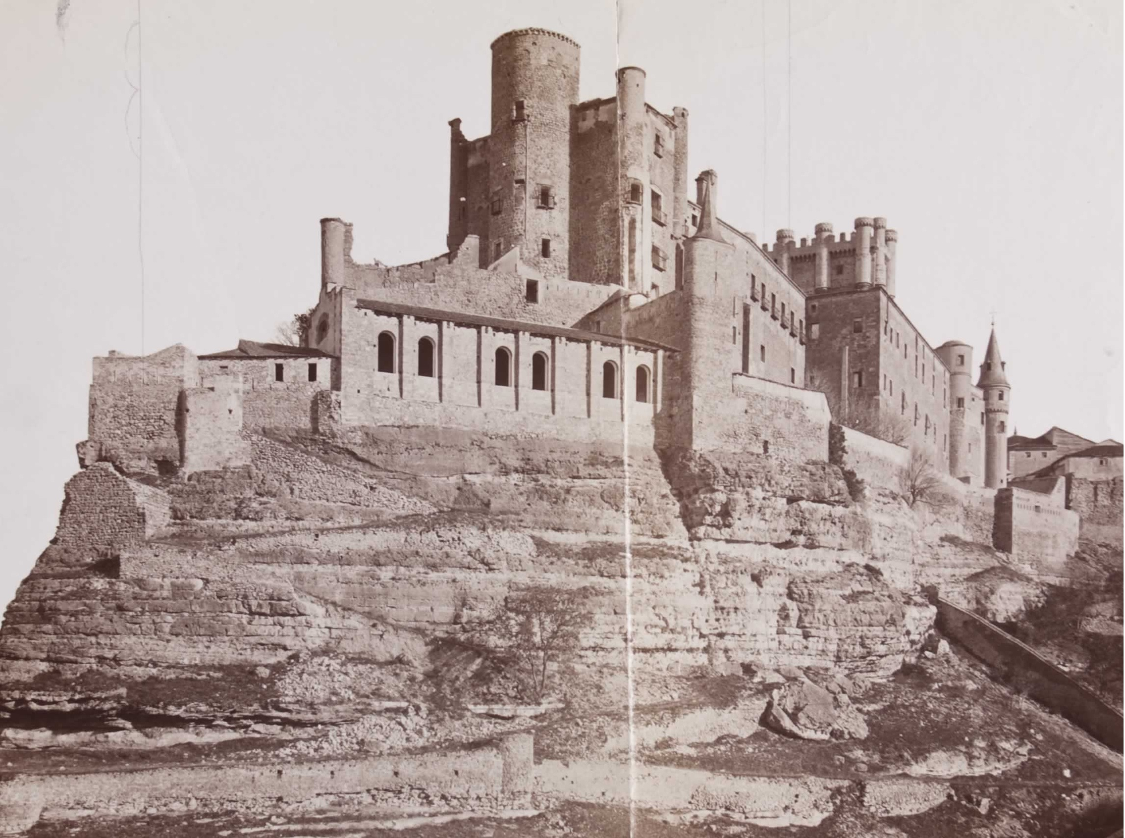 Fotografía de J.Laurent, finales siglo XIX, Alcázar de Segovia.